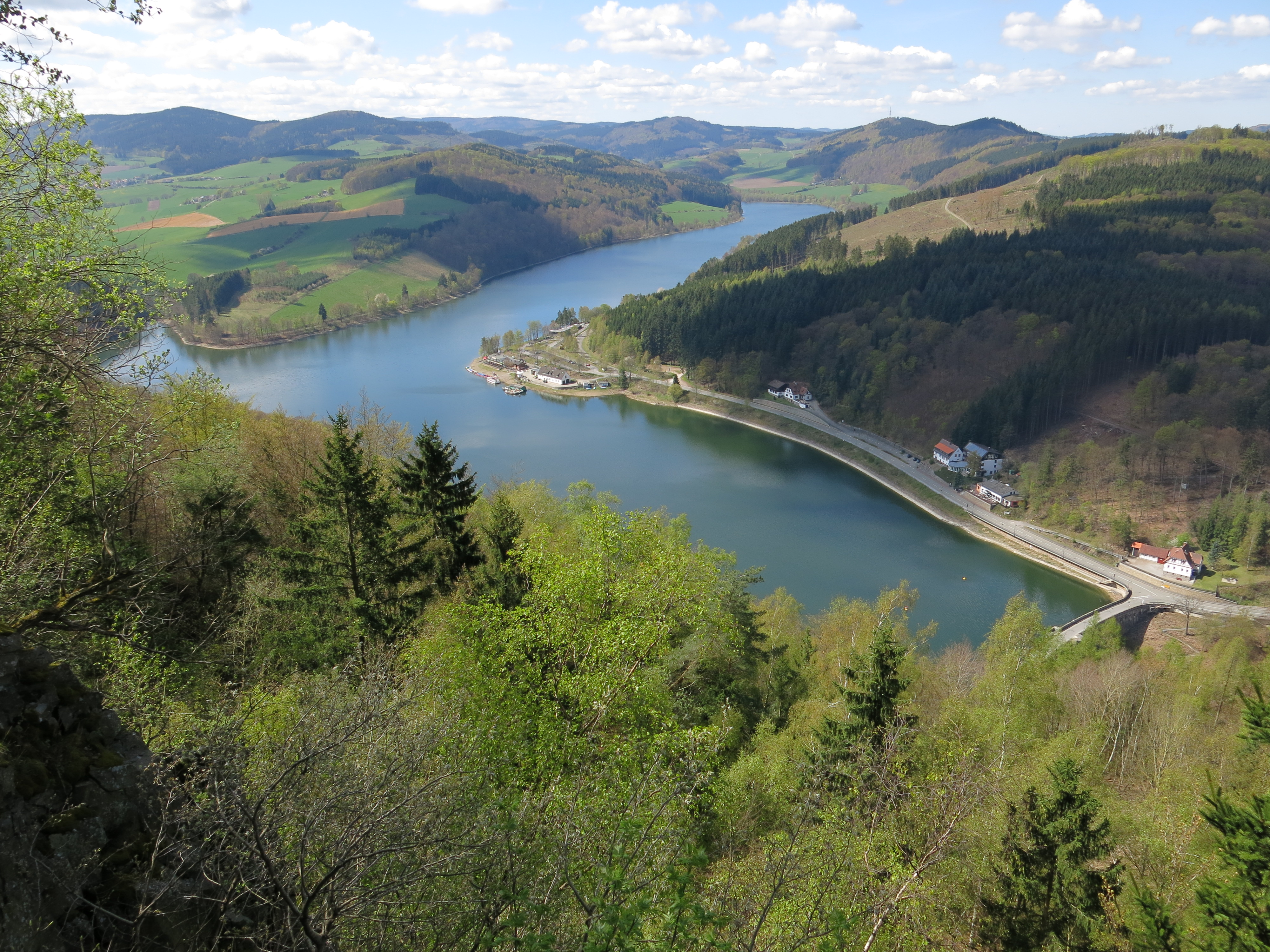 Blick von einem Aussichtspunkt am Nordwesthang des Eisenbergs auf den nördlichen Teil des Diemelsees mit dem Itterarm und der Sperrmauer.